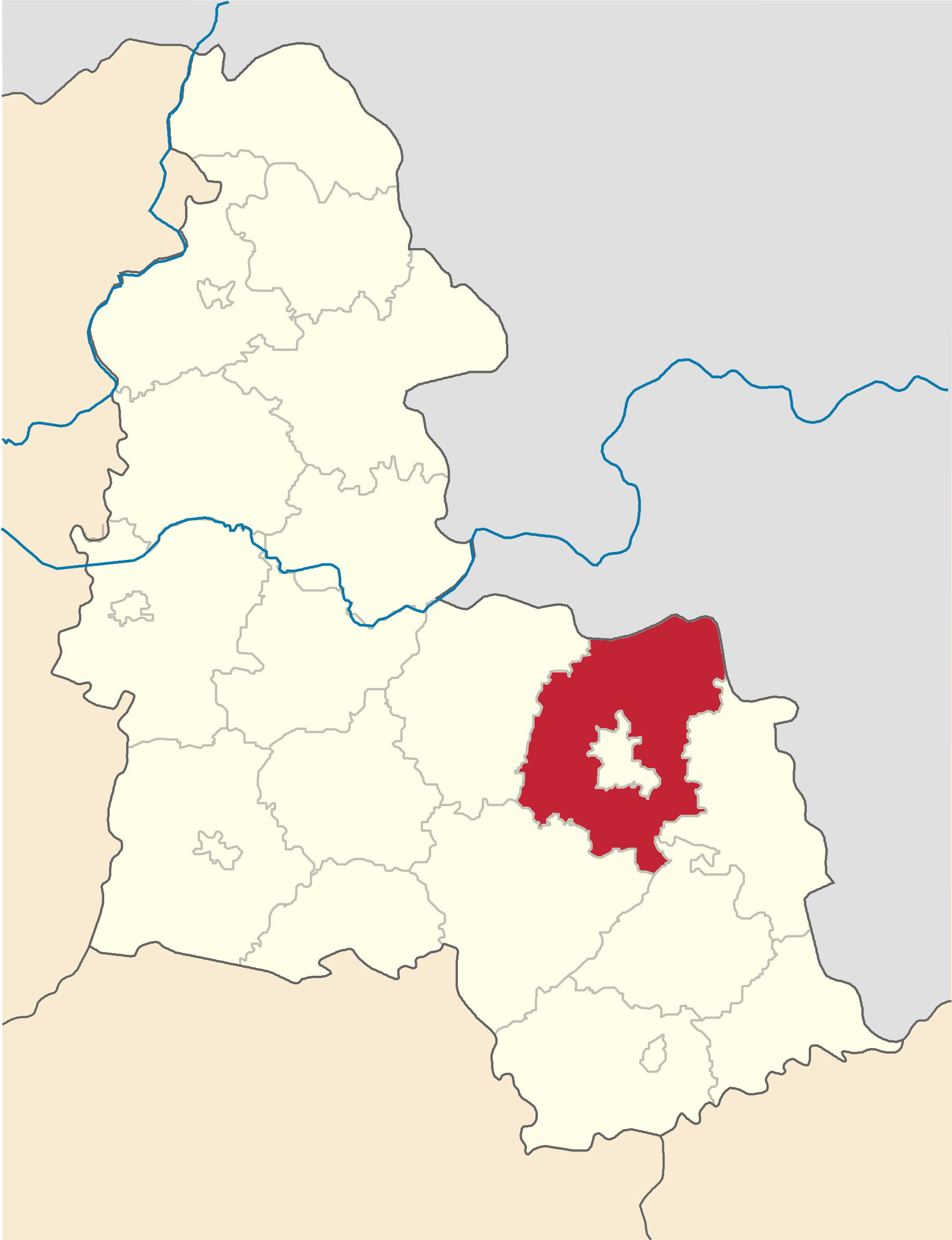 Sumskyi-Raion map